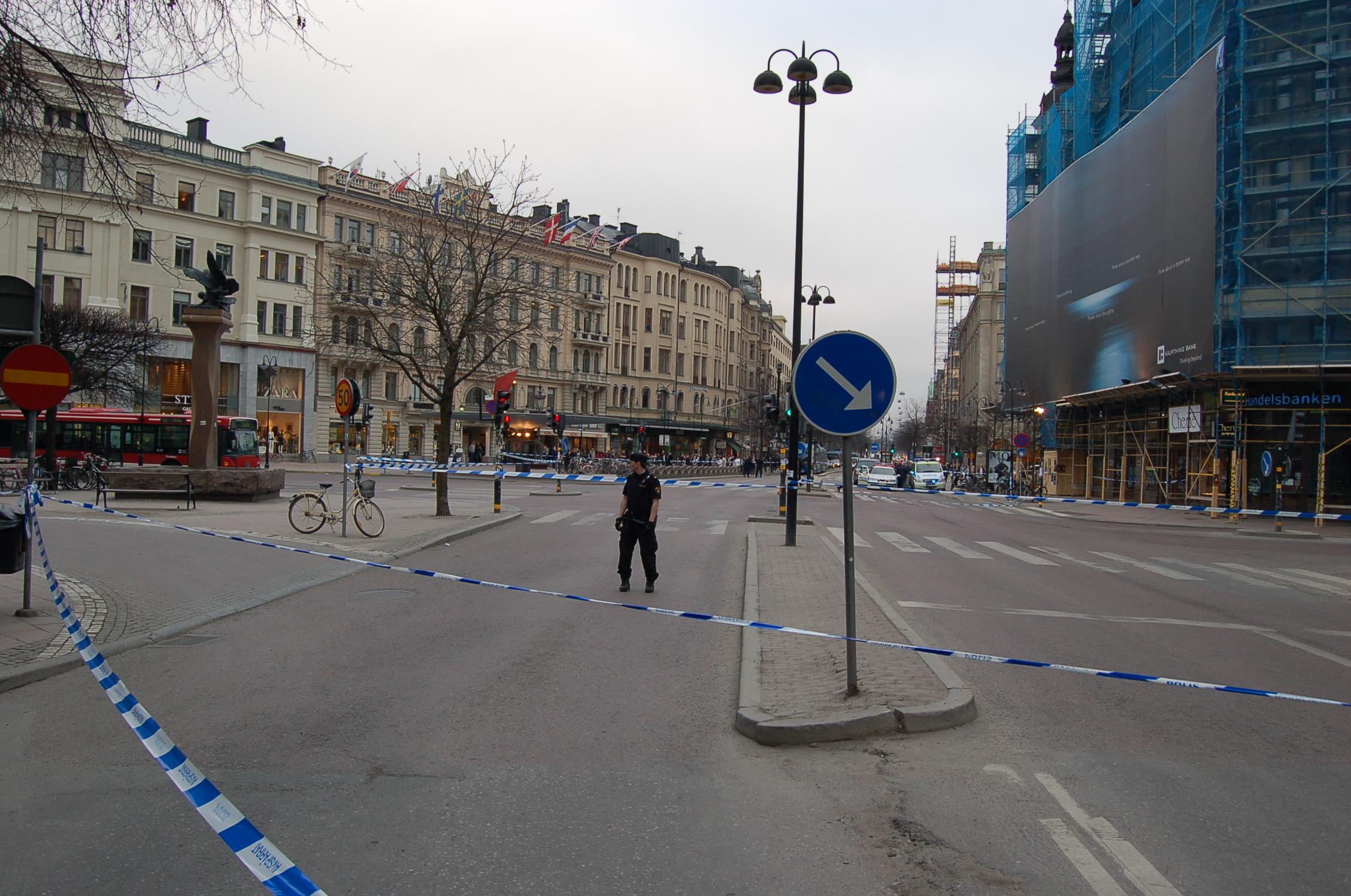 Avspärrning av Stureplan, Stockholm i samband med rån 2006-04-25.